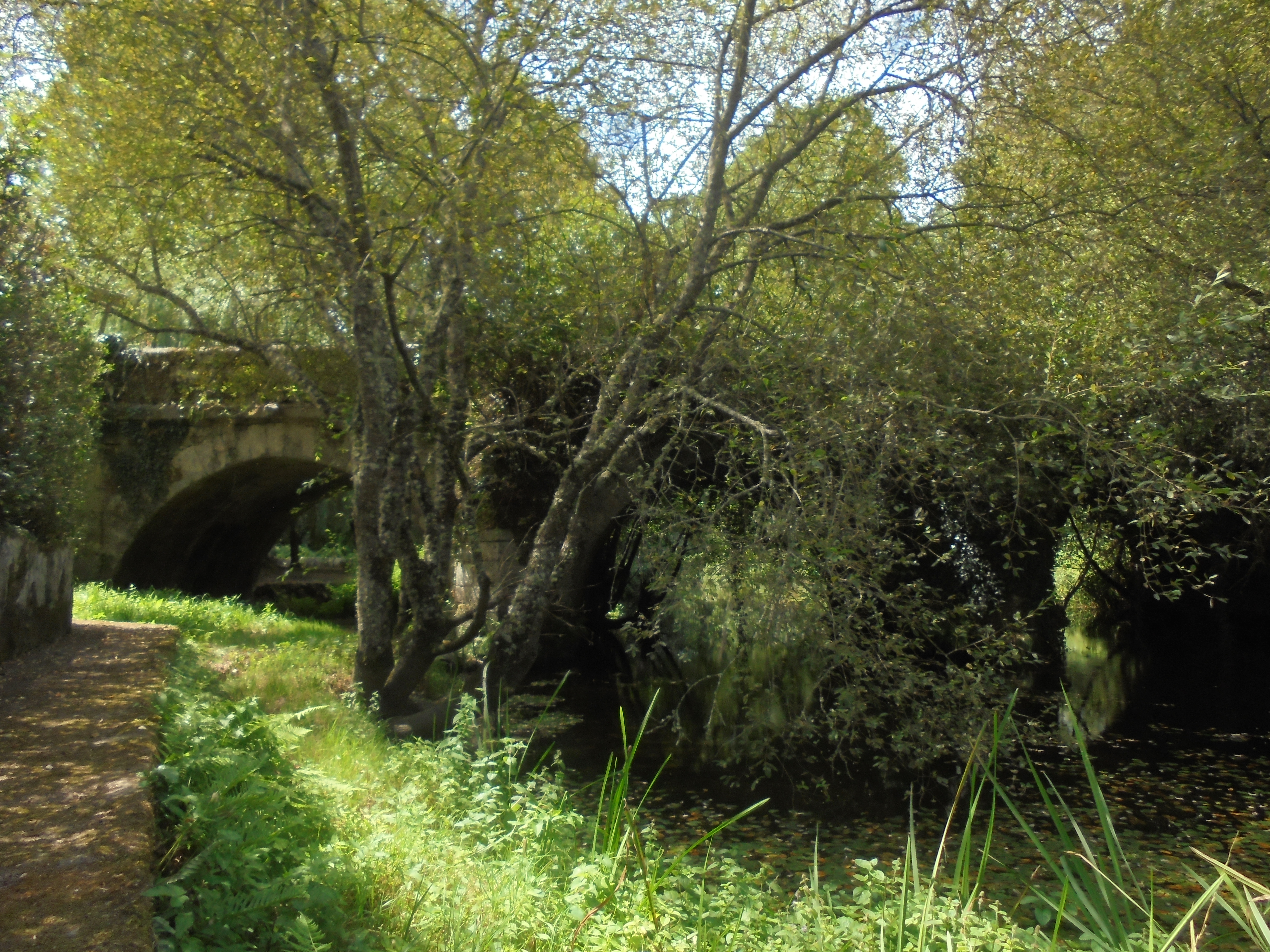 Ponte do Vao ( Laxosa -O Corgo)